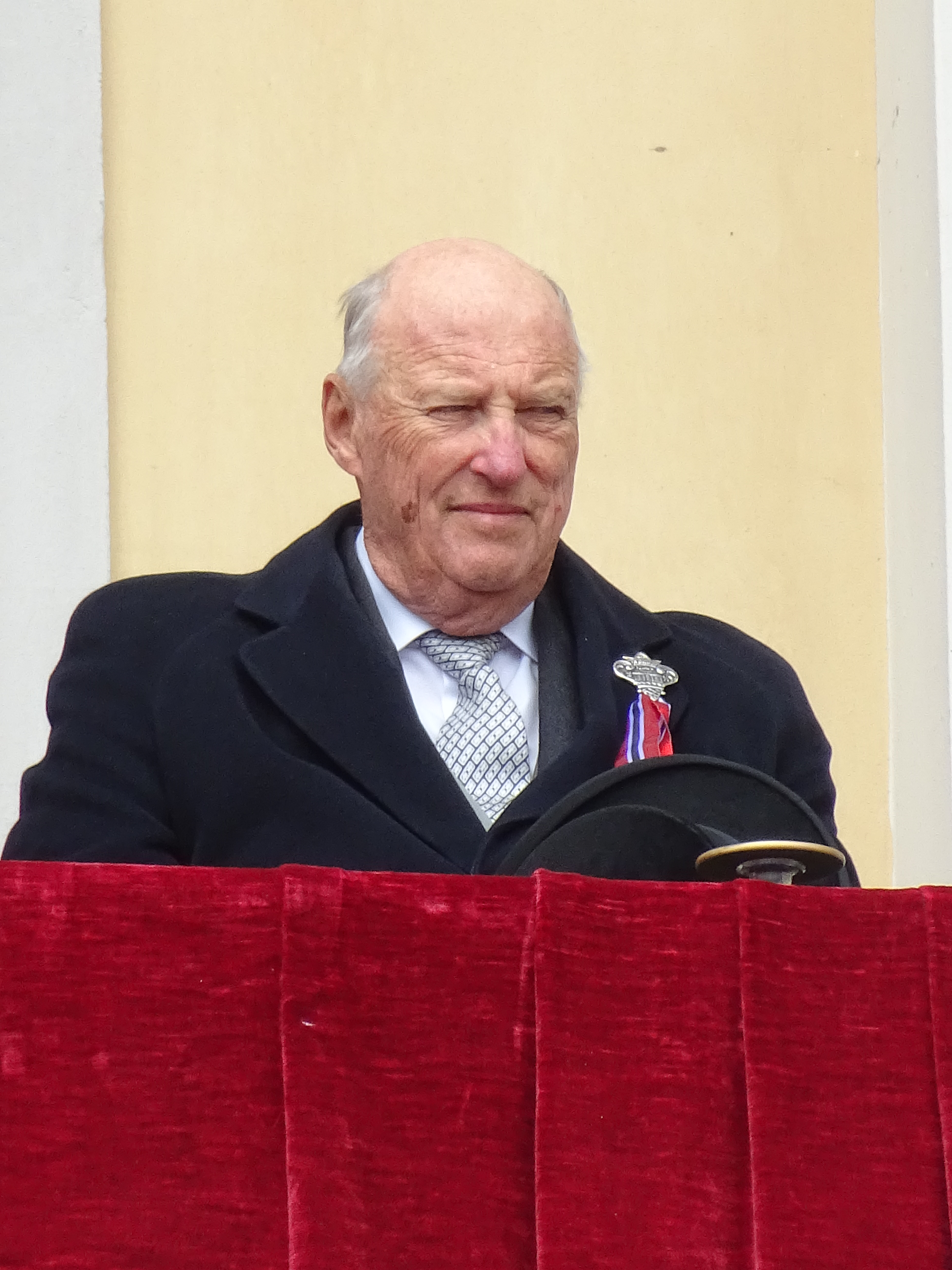 Harald V, le 17 mai 2018 à Oslo